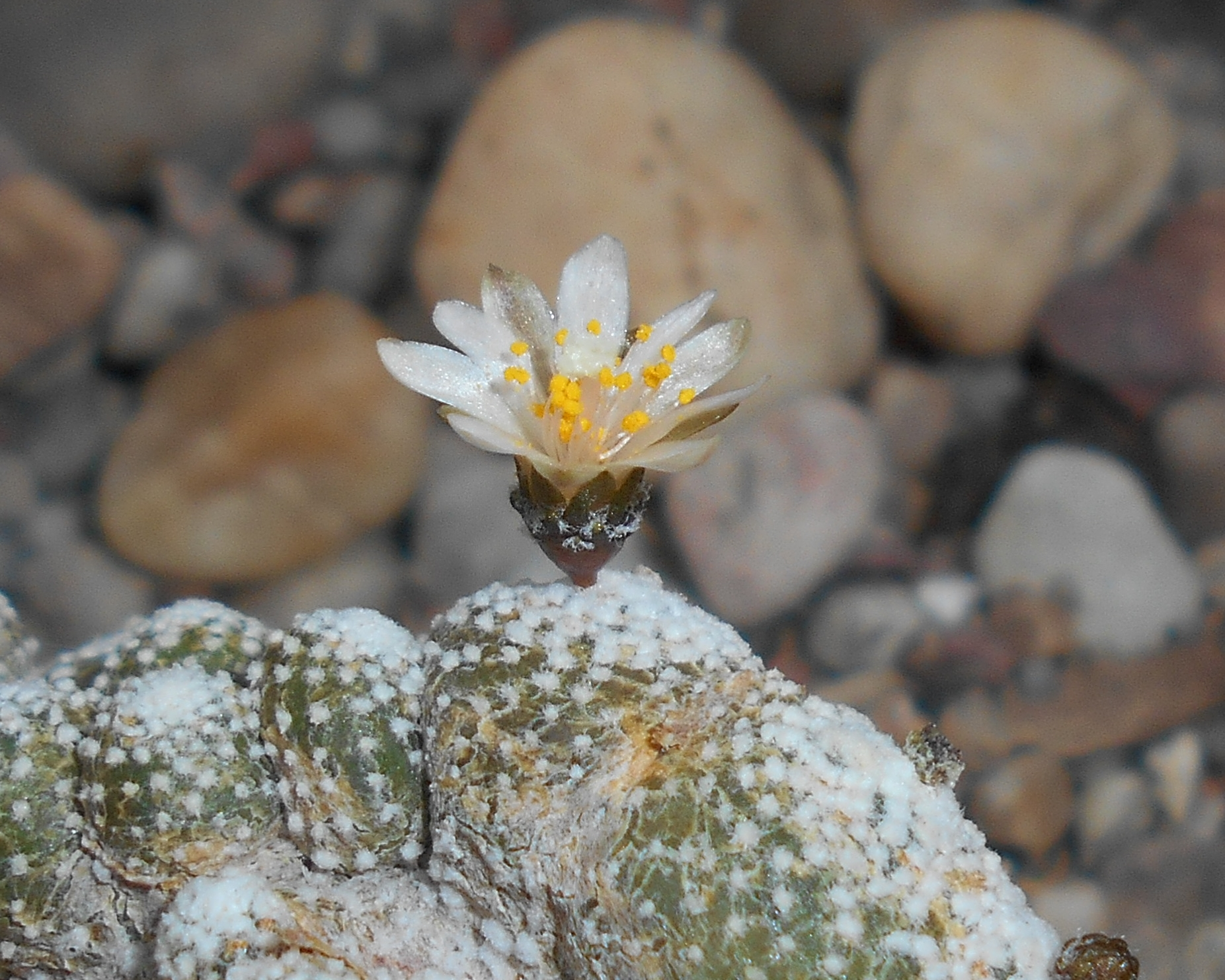 Blossfeldia liliputana, Ogród Botaniczny UMCS w Lublinie.